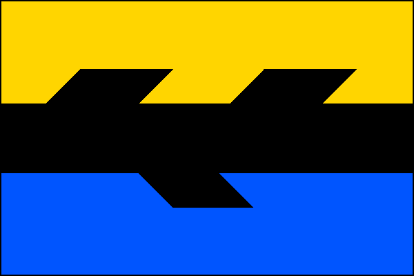 vlajka, Škrdlovice, okres Žďár nad Sázavou